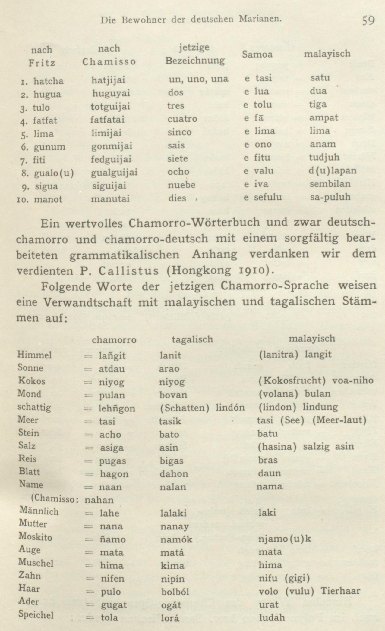 Beispiele aus Pater Callistus Lopinot: Chamorro Wörterbuch; nebst einer Chamorro-Grammatik. Typis Societatis Missionum ad Exteros, Hong Kong 1910, 33 Seiten